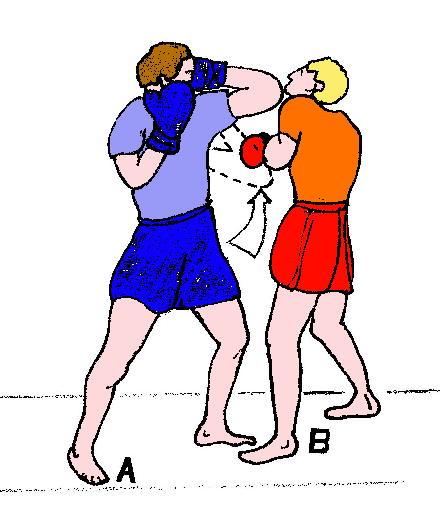 Coude remontant